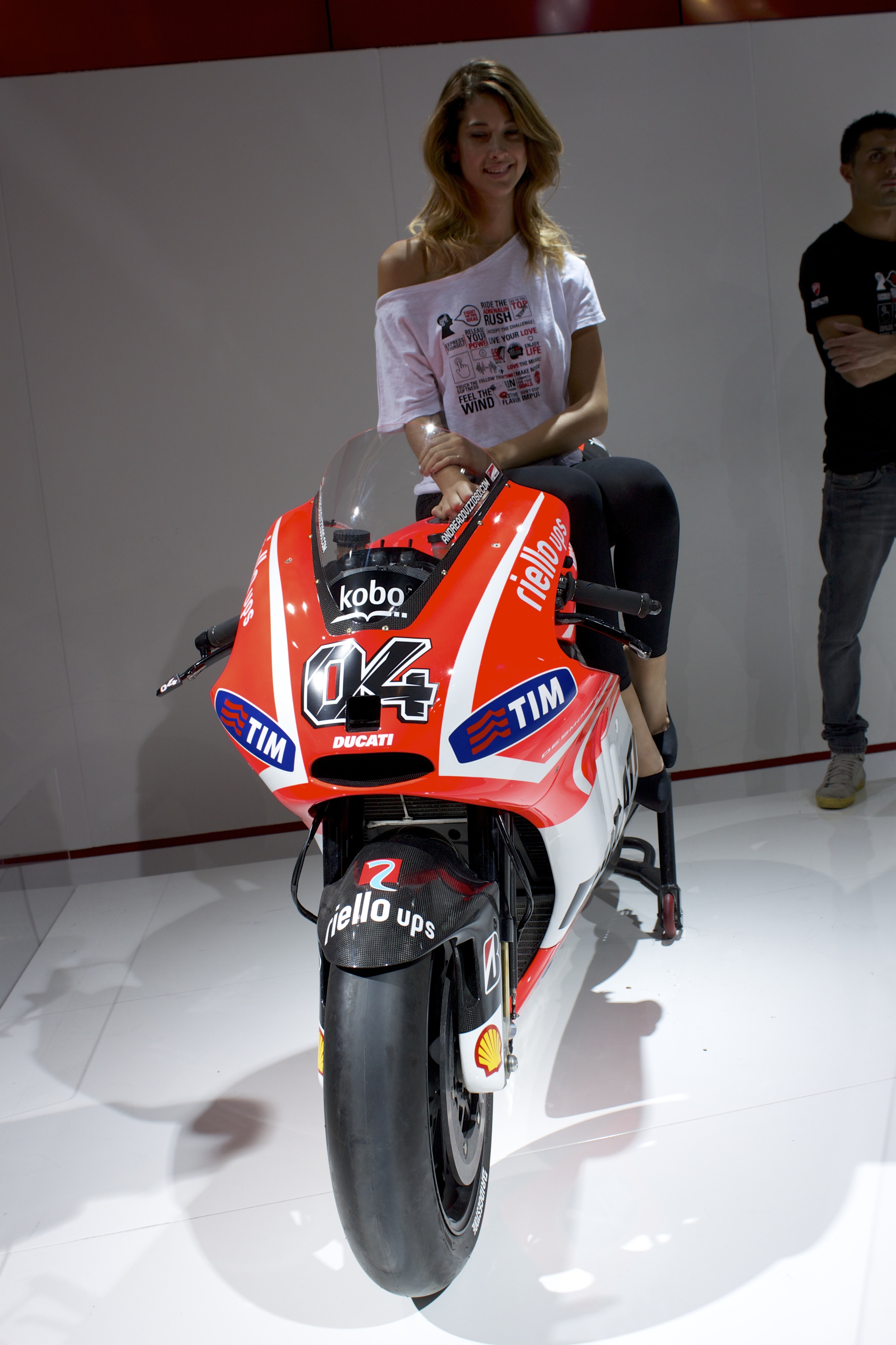 Ducati MotoGP 04